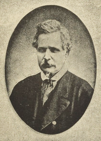 Portrait de James Miln (1819-1881), fondateur du musée de préhistoire à Carnac